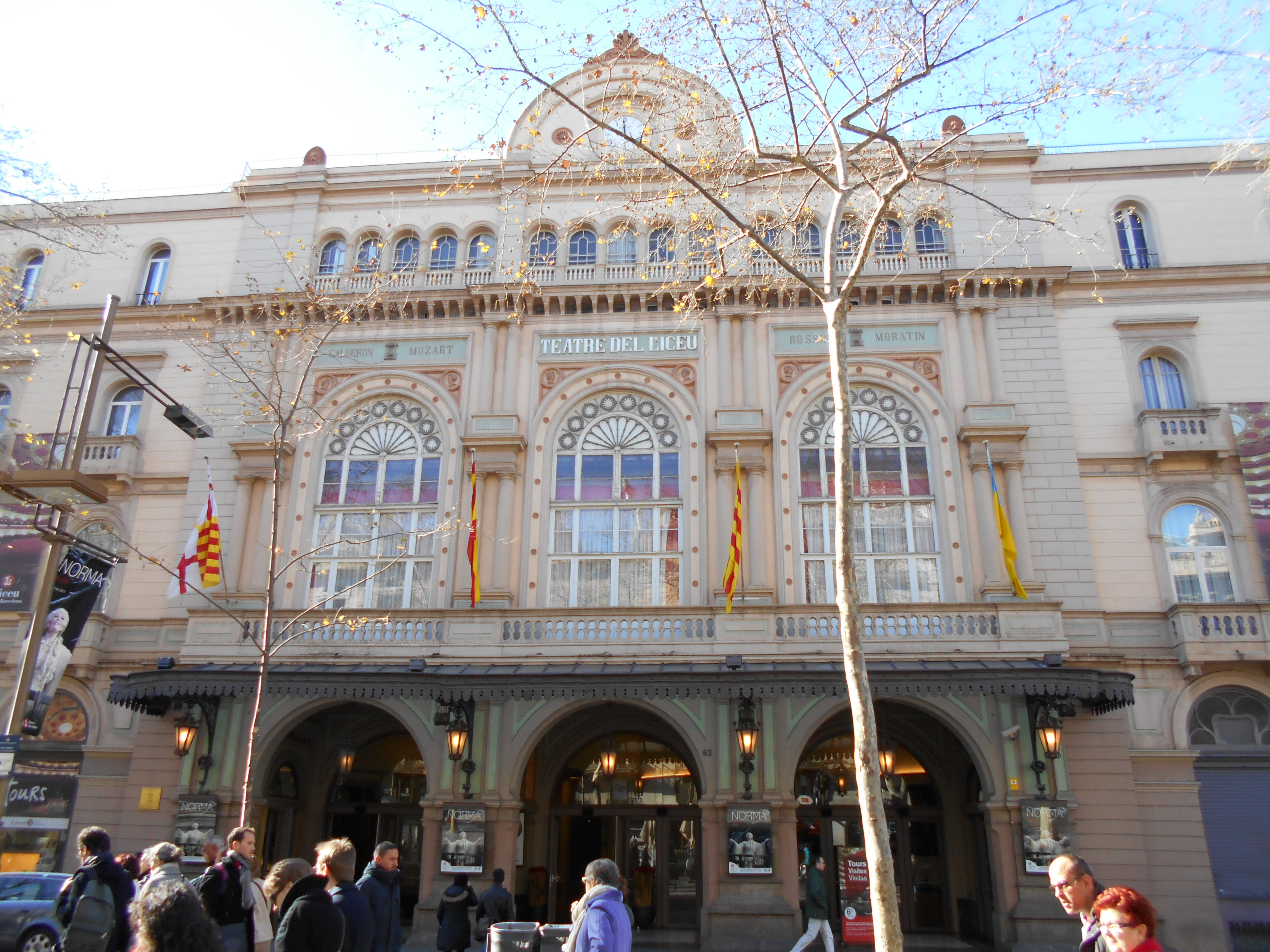 Gran Teatro del Liceo.